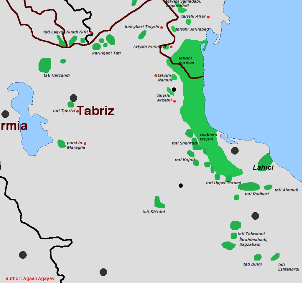 диалекты языка тати по участкам